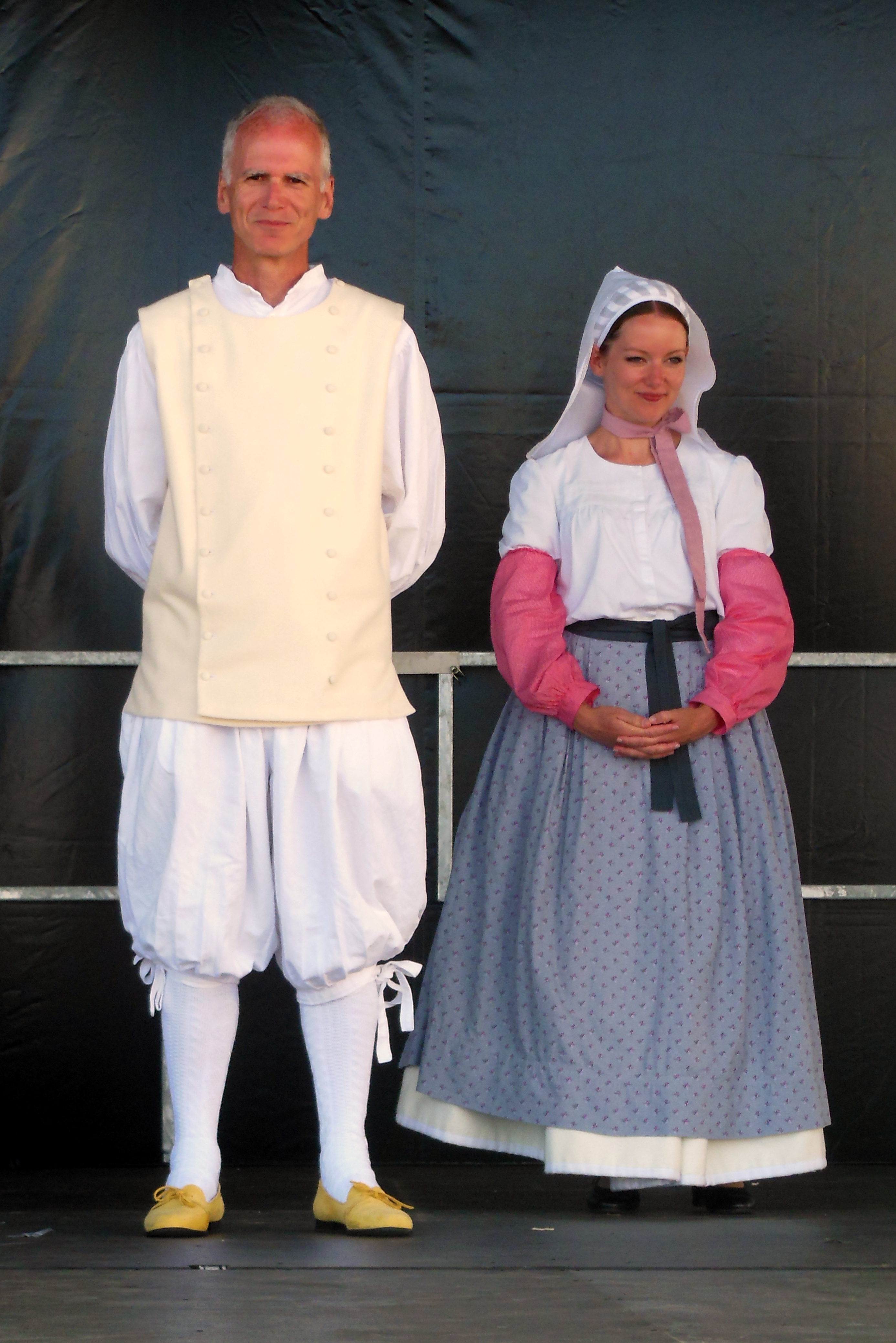 Costume traditionnel de Trescalan. Membres de la troupe Strollad An Tour Iliz, lors des 150 ans de La Turballe.